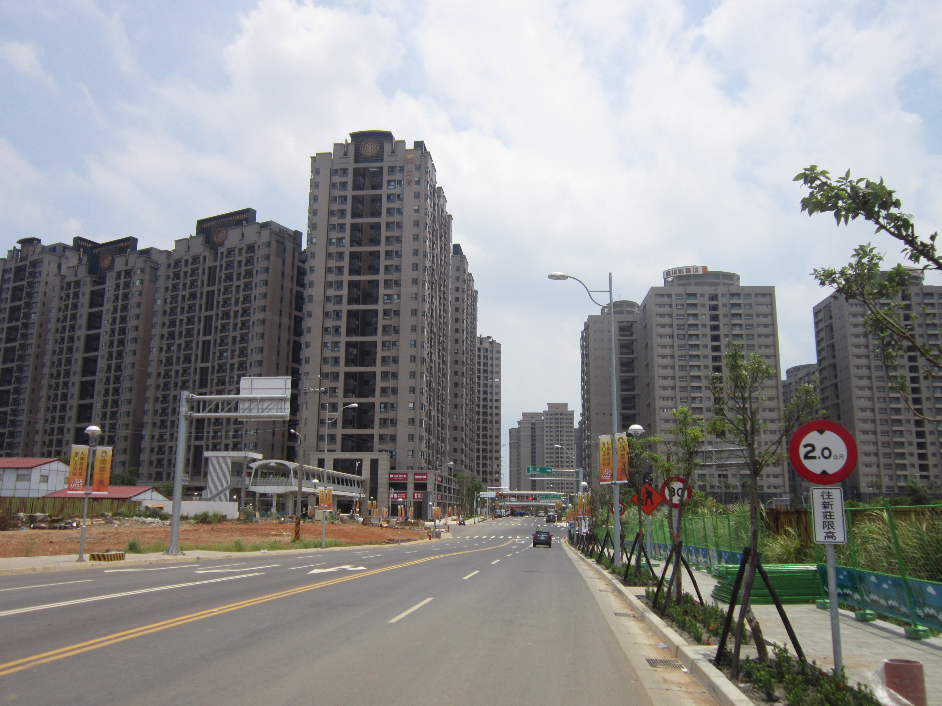 A7合宜住宅近照(2016-7-25)